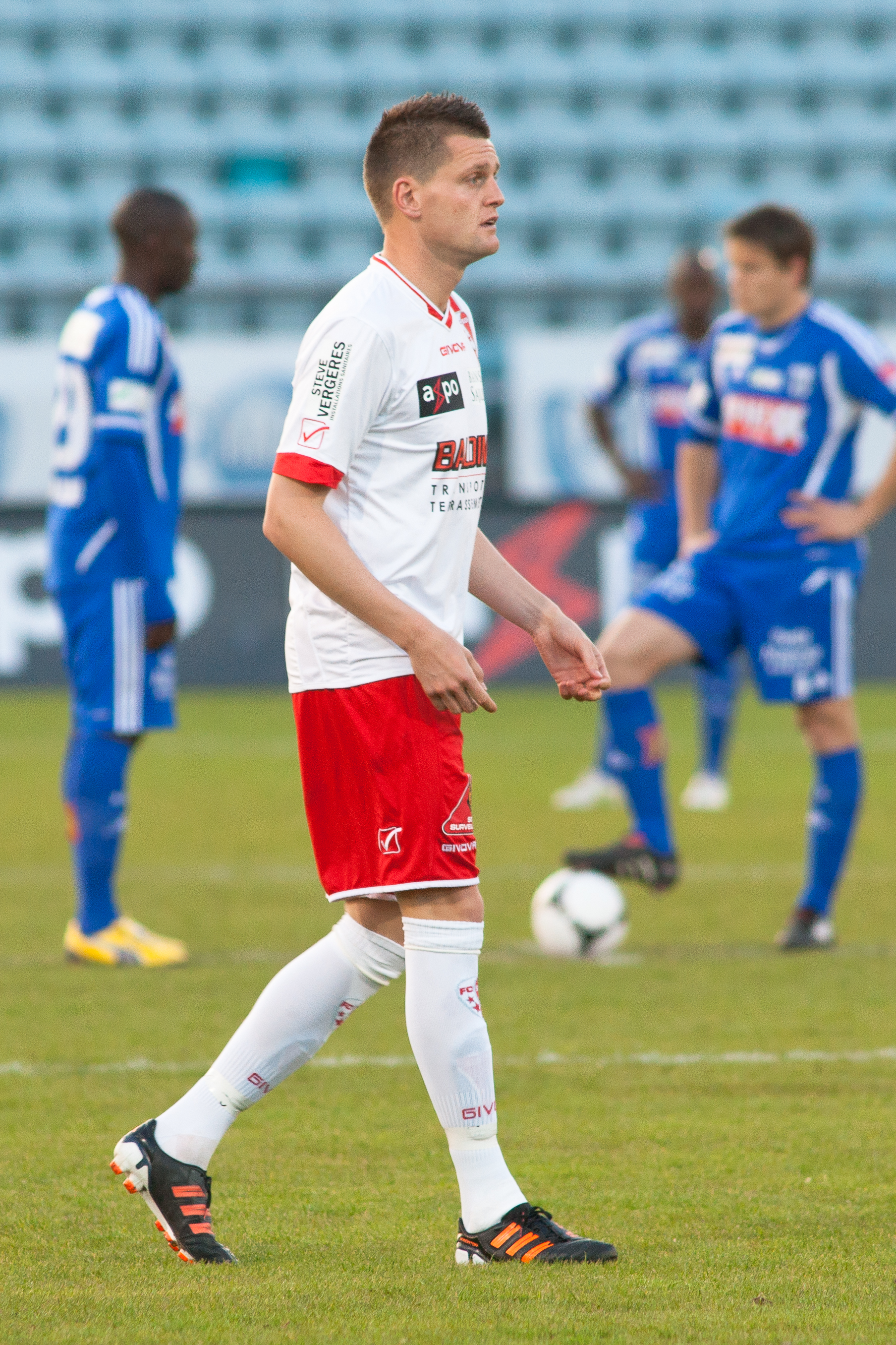 Michael Dingsdag - Lausanne vs Sion 02 may 2012